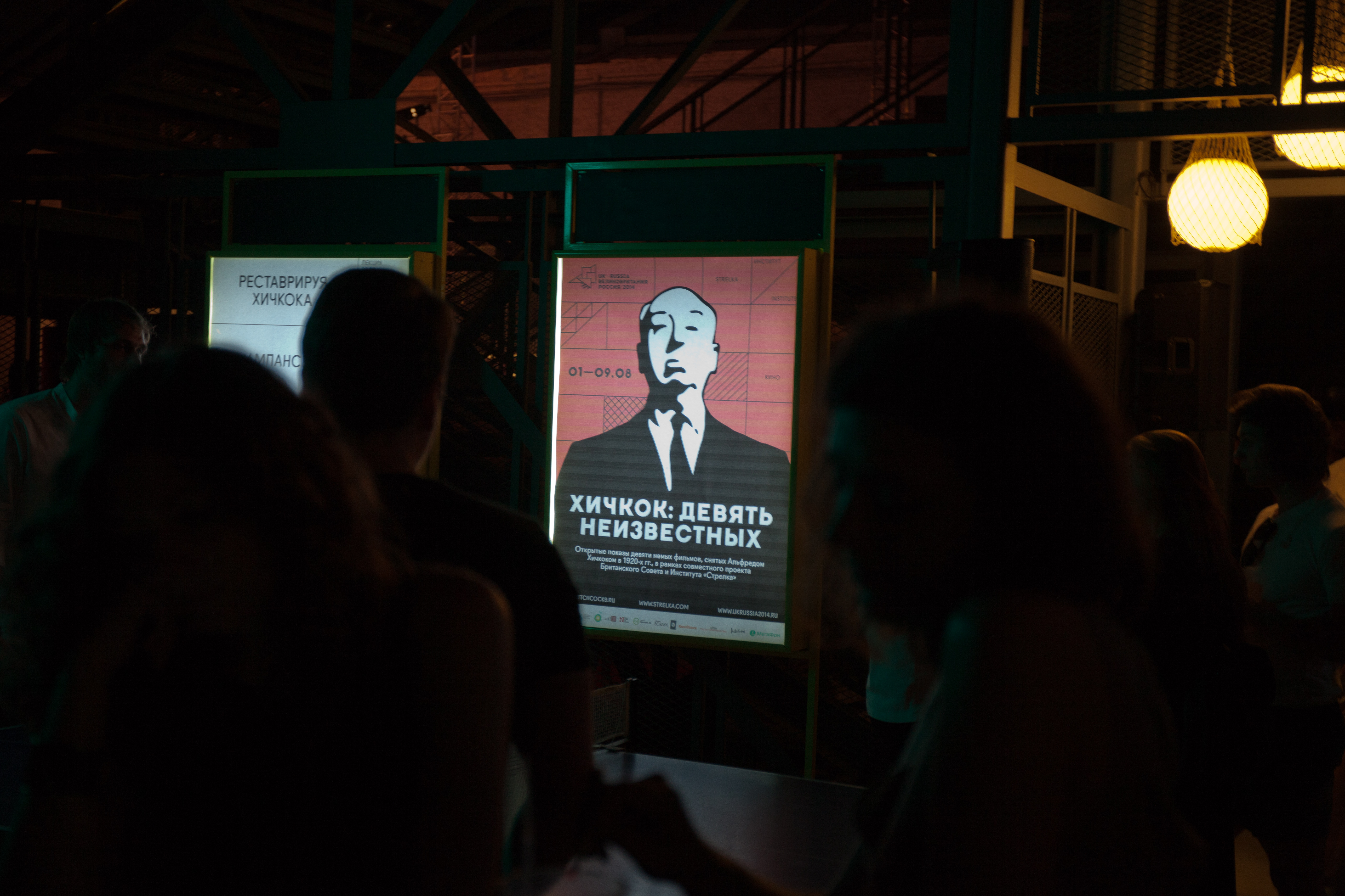 Фестиваль "Хичкок: девять неизвестных" в Москве. Открытие фестиваля, прессконференция, показ фильма "Ринг".